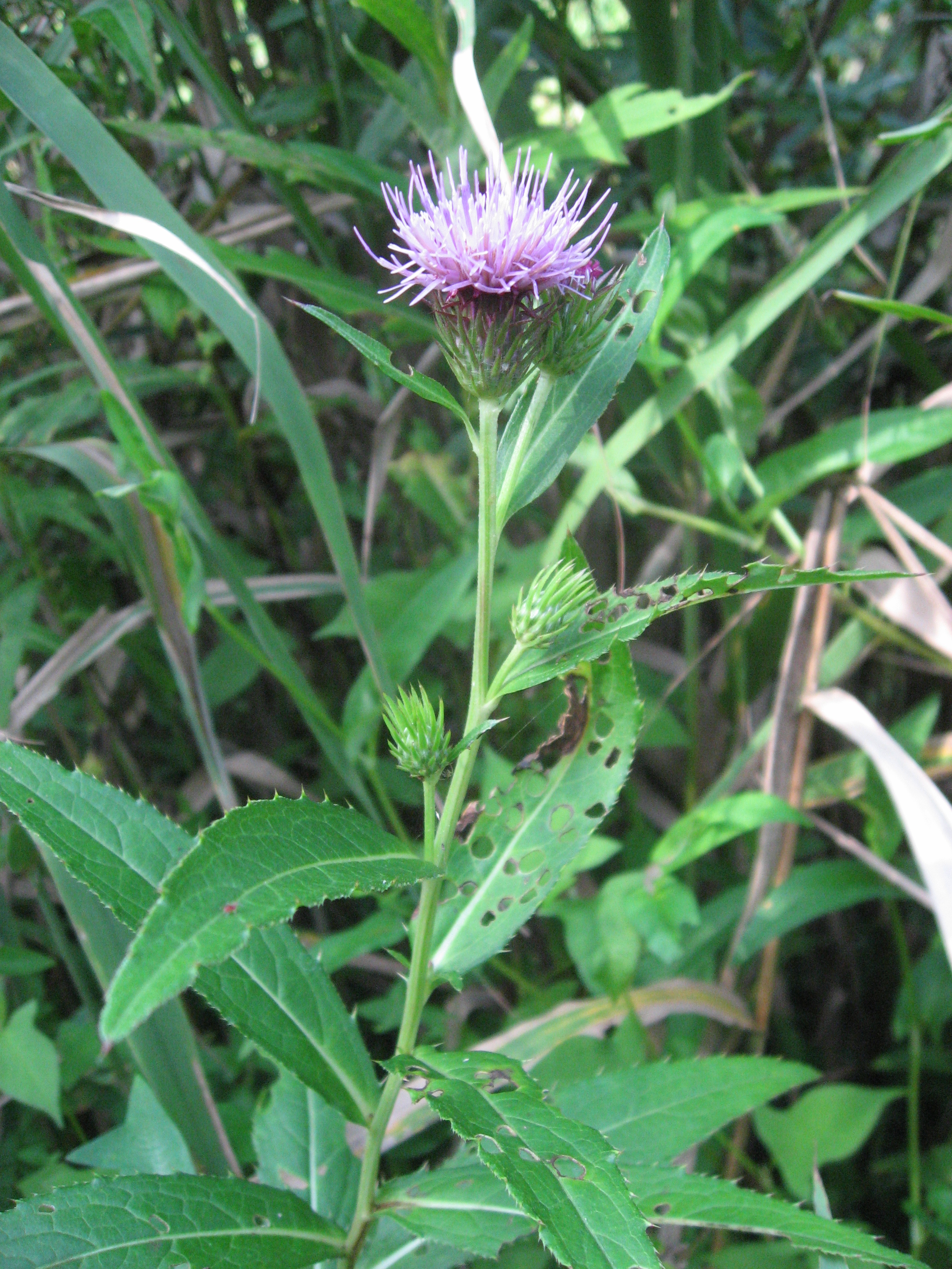 Cirsium_borealinipponense タチアザミ 福島県会津地方